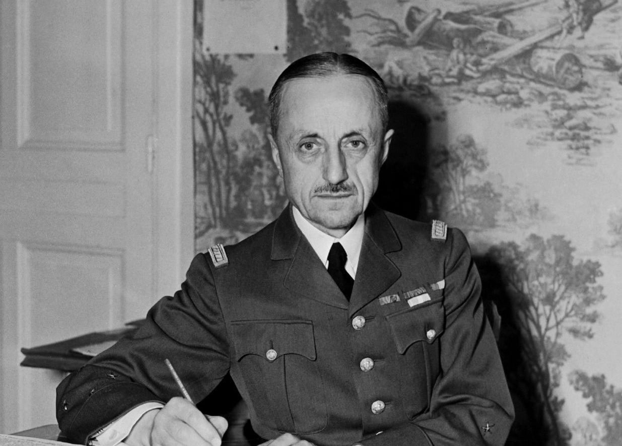 Le général Émile Laure, secrétaire général du cabinet de Philippe Pétain au début du régime de Vichy.